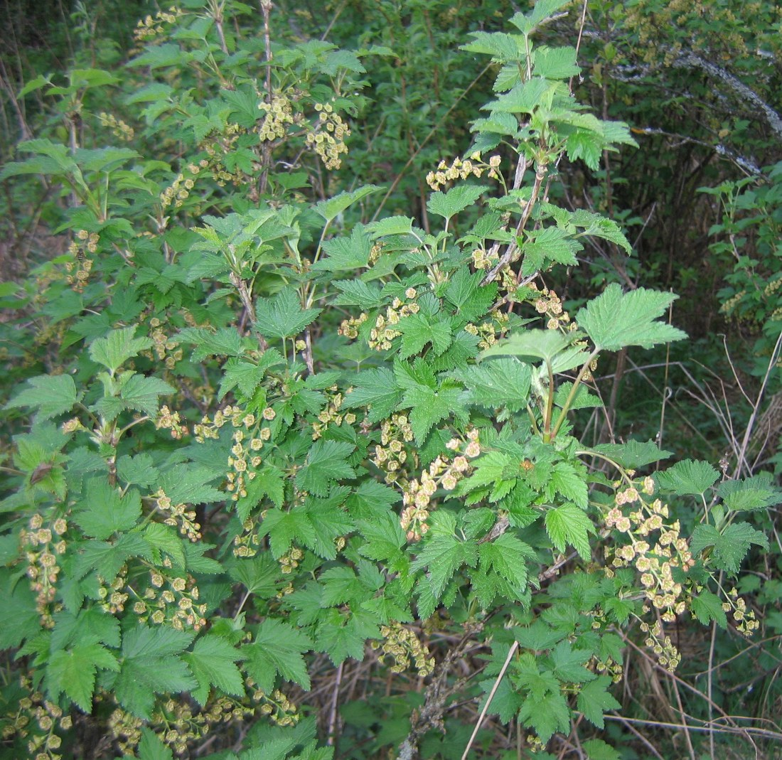 Autoriaus nuotrauka, 2006.05.13. Žydintys raudonieji serbentai (Ribes rubrum). Nuotrauka gali būti platinama pagal GFDL licenciją.